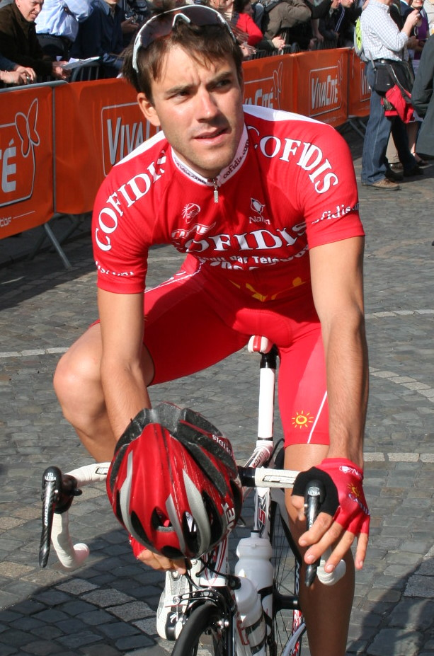 Amaël Moinard au départ de Liège Bastogne Liège 2008